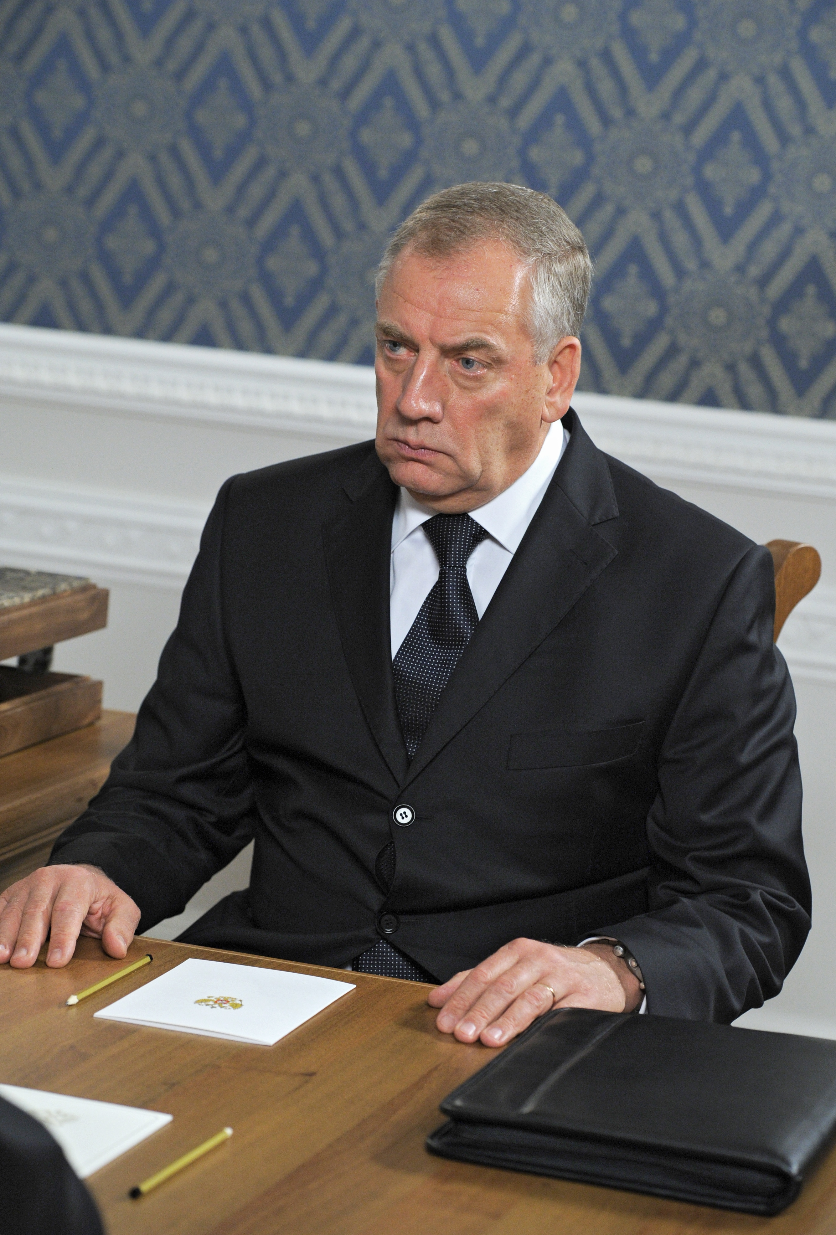 Губернатор Новгородской области Сергей Митин на рабочей встрече с Председателем Правительства РФ Владимиром Путиным